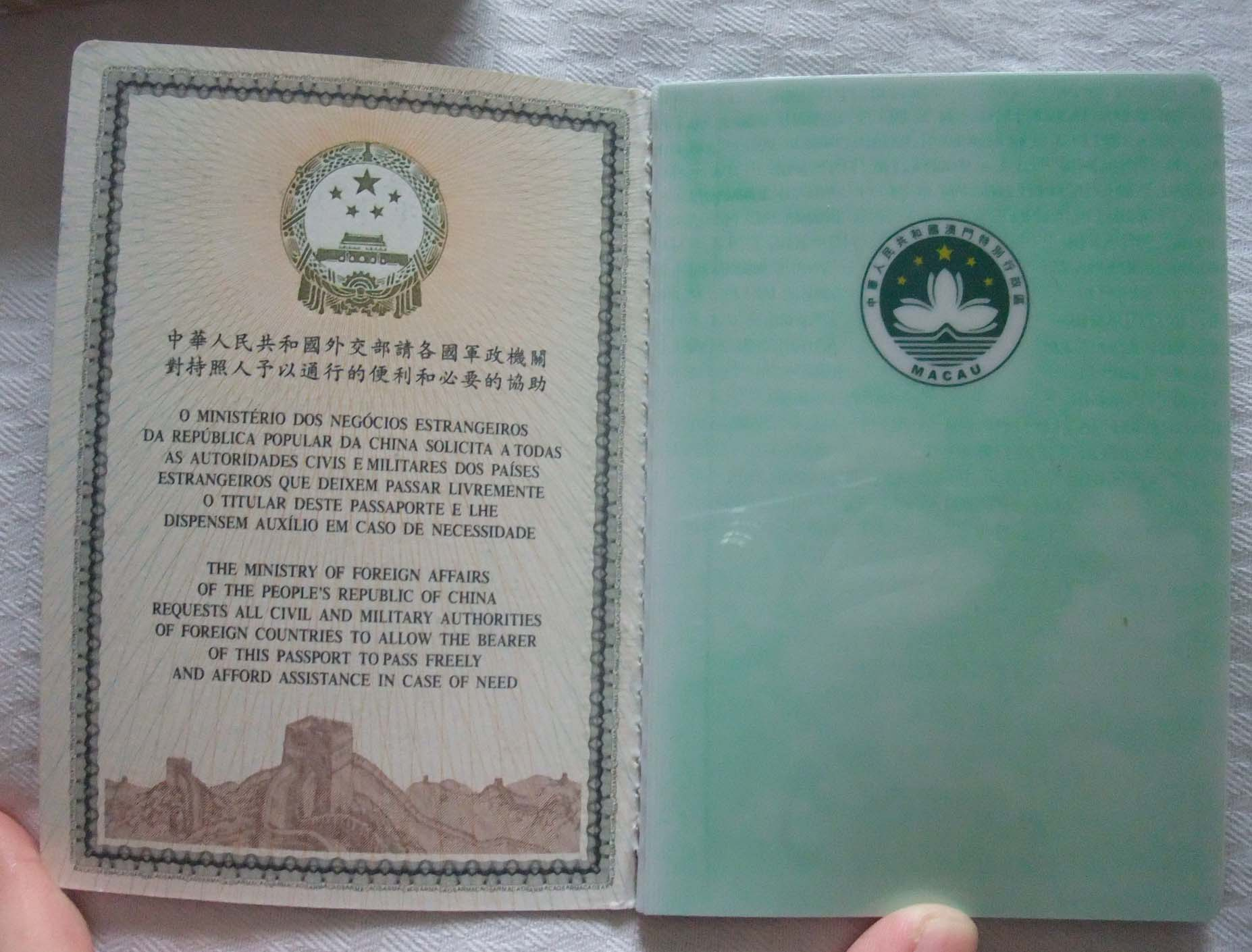 中文（香港）: 新版澳門特區電子護照「請求頁」。內容以中、葡、英三語標示。右面是新版澳門特區電子護照的「個人資料頁」背面。